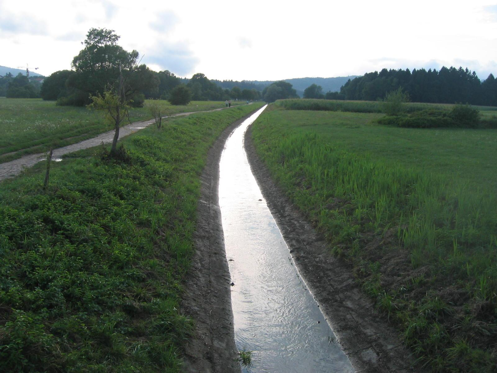 Glinščica, a stream in Ljubljana, Slovenia photo:Ziga 08:11, 13 August 2006 (UTC)